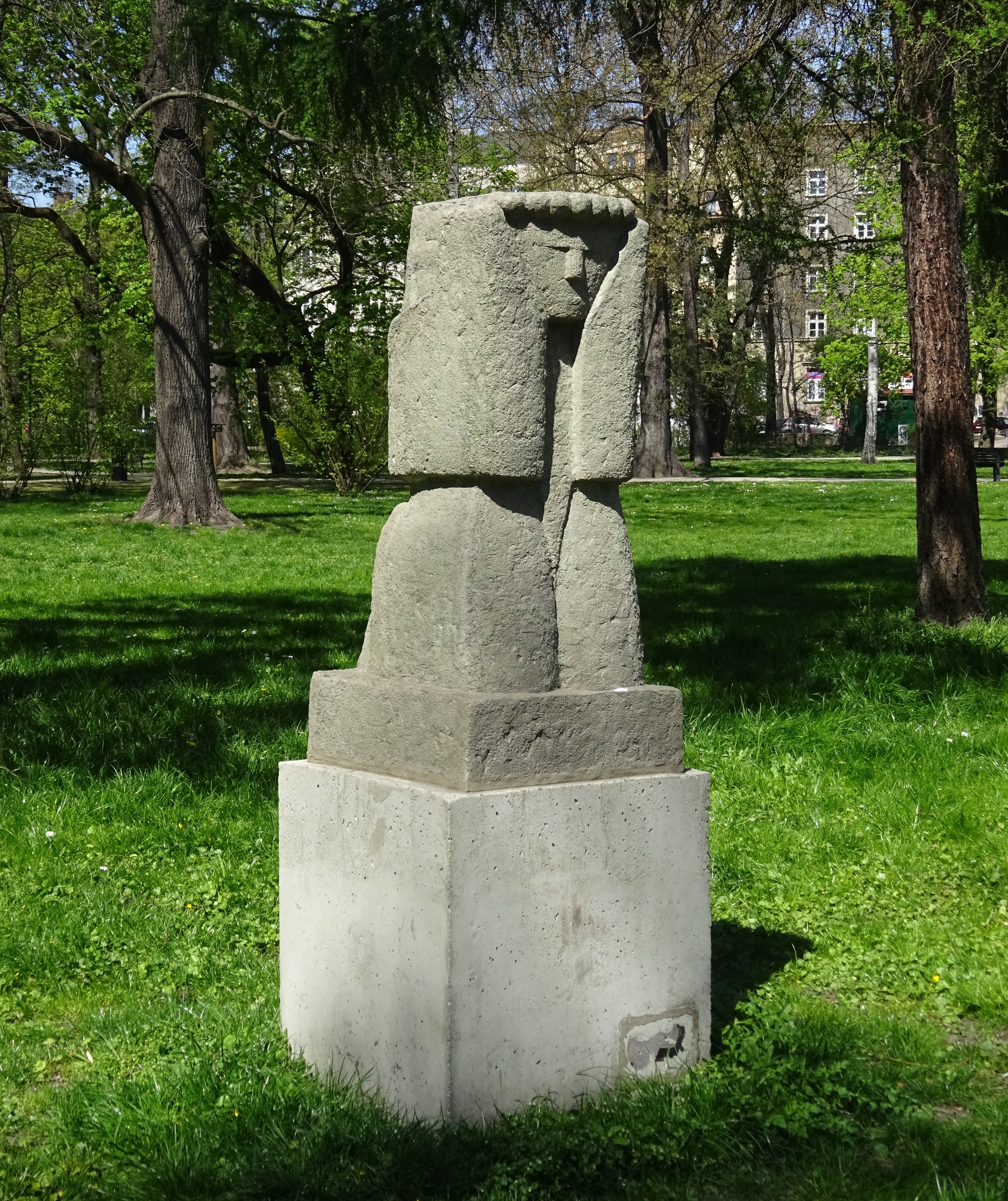 Rzeźba „Zamyślenie”, autorstwa Romana Tarkowskiego z II połowy XX wieku, znajdująca się w Parku Krakowskim w Krakowie.